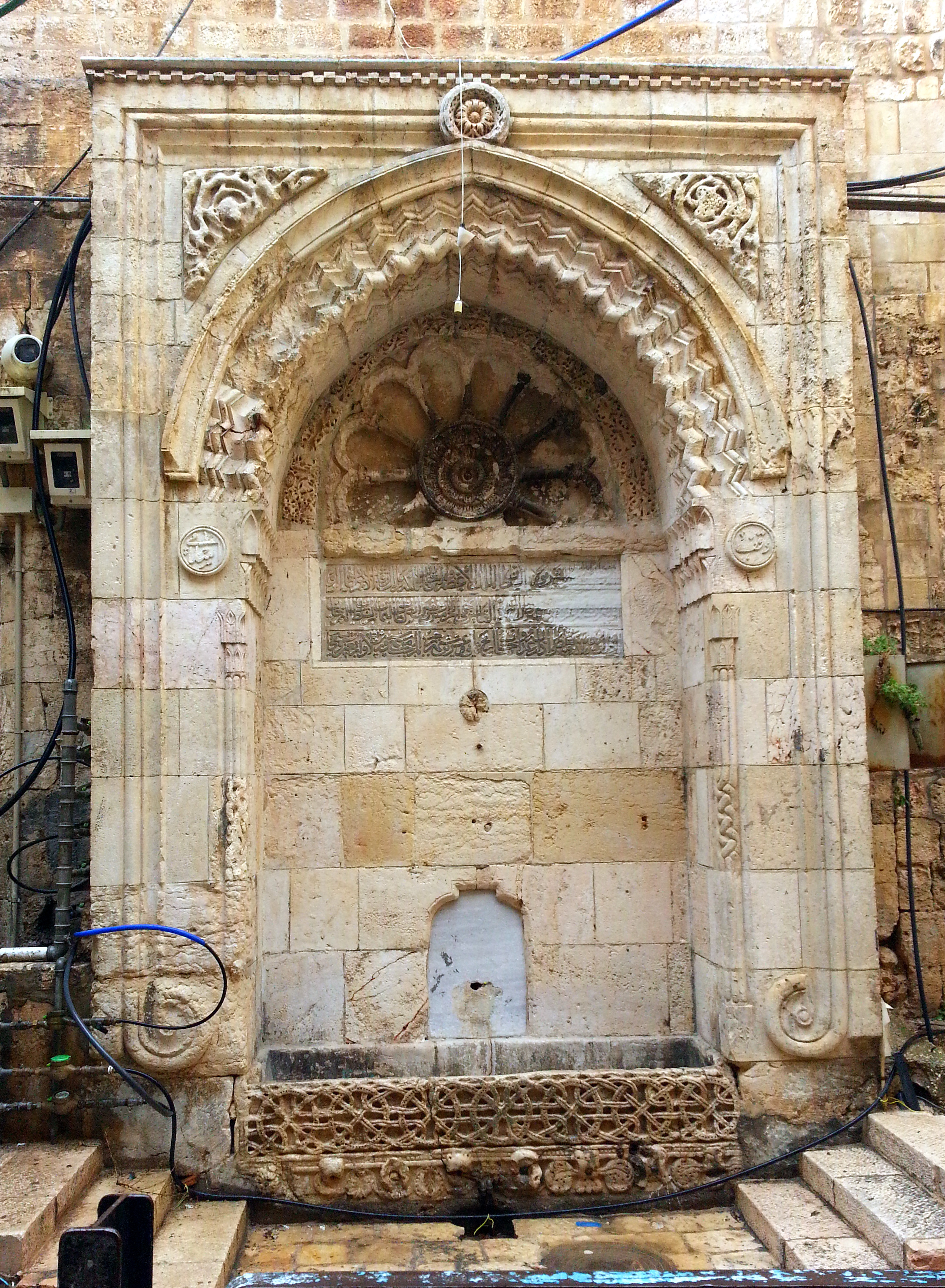 שער השלשלת